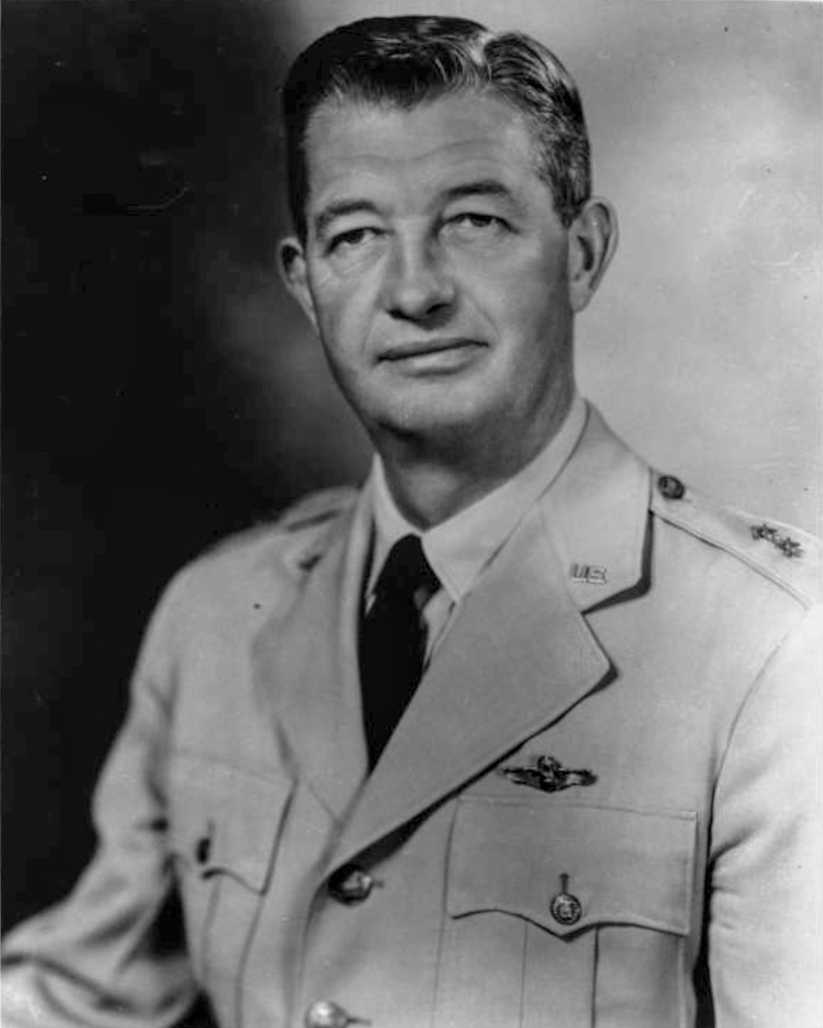 Major General Edward W. Anderson